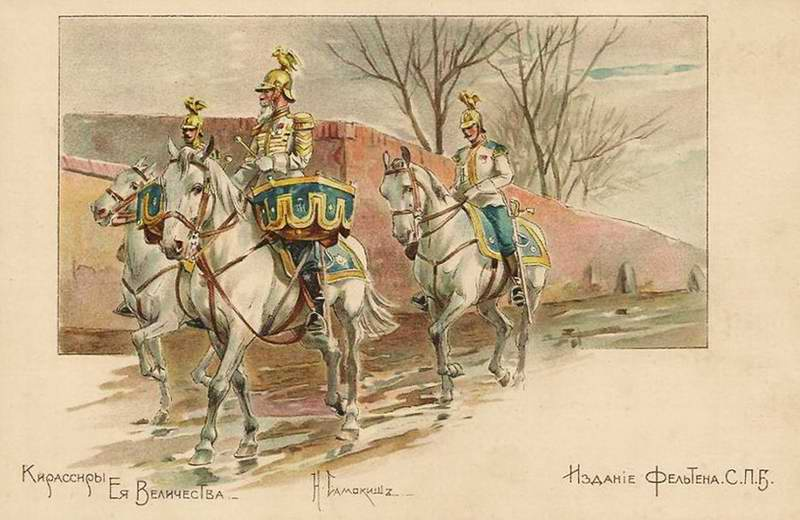 N. Samokiche. Кирассиры Её Величества. Издание Фельтена. С.П.Б.